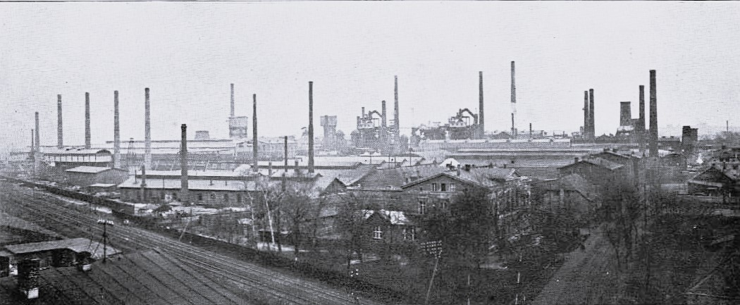 eisenwerk Bismarckhütte in Oberschlesien